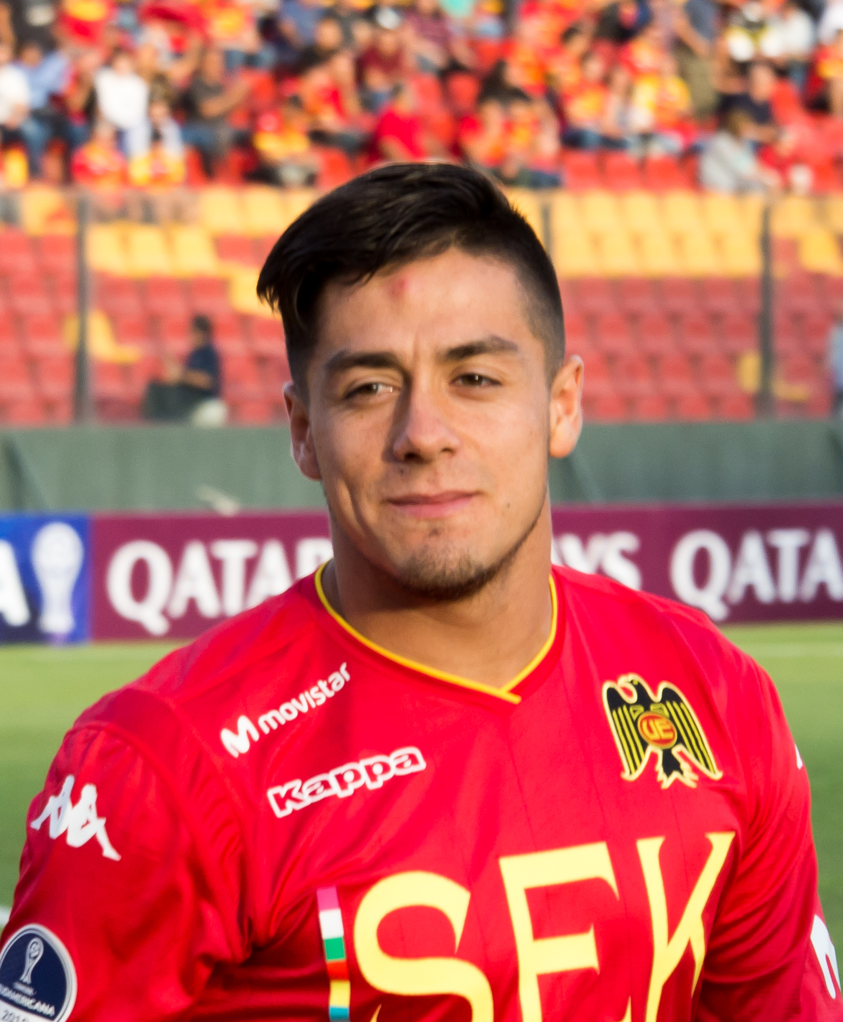 Rodrigo González, Unión Española v Mushuc Runa, Estadio Santa Laura, Independencia, Santiago, Región Metropolitana, Chile.